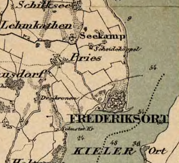 Frederiksort på Kaart over Slesvigs Fastland og Als